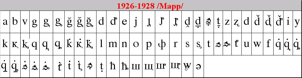 Abkhaz alphabet by Marr (1926-1928)